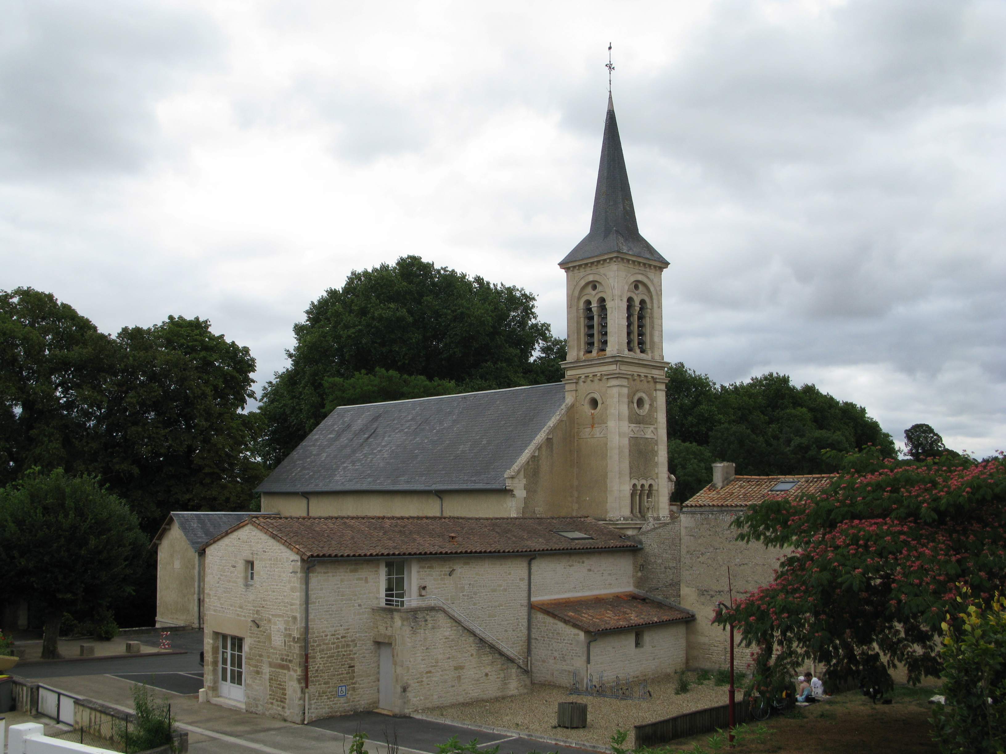 L'église de Saint-Maxire